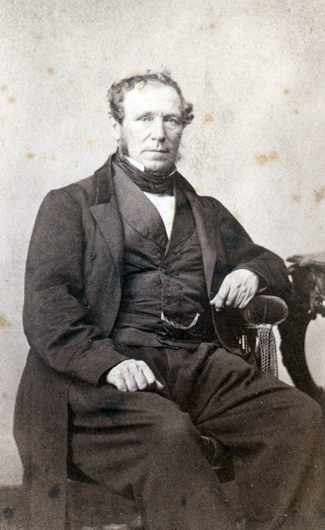 Laurent Sazie (Lorenzo Sazie) (Monpezat, Francia, 16 de julio de 1807 - † Santiago, Chile, 1865) fue el primer médico en Chile en usar la anestesia general, fundador de la Escuela de Obstetricia y primer Decano de la Escuela de Medicina de la Universidad de Chile.